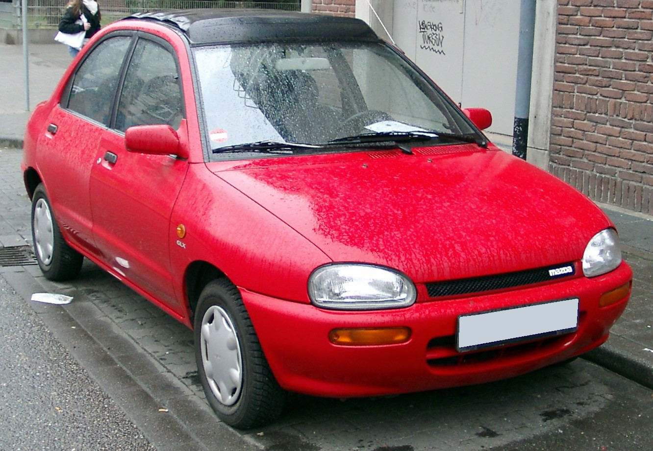 Mazda 121, 2. Generation